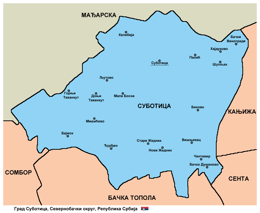 Опис: мапа административног подручја Града Суботице. Извор: (оригинална мапа са енглеске википедије је касније премештена на оставу)